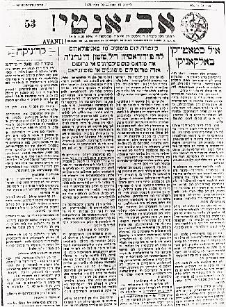 Главата на вестник "Аванти" (1912).